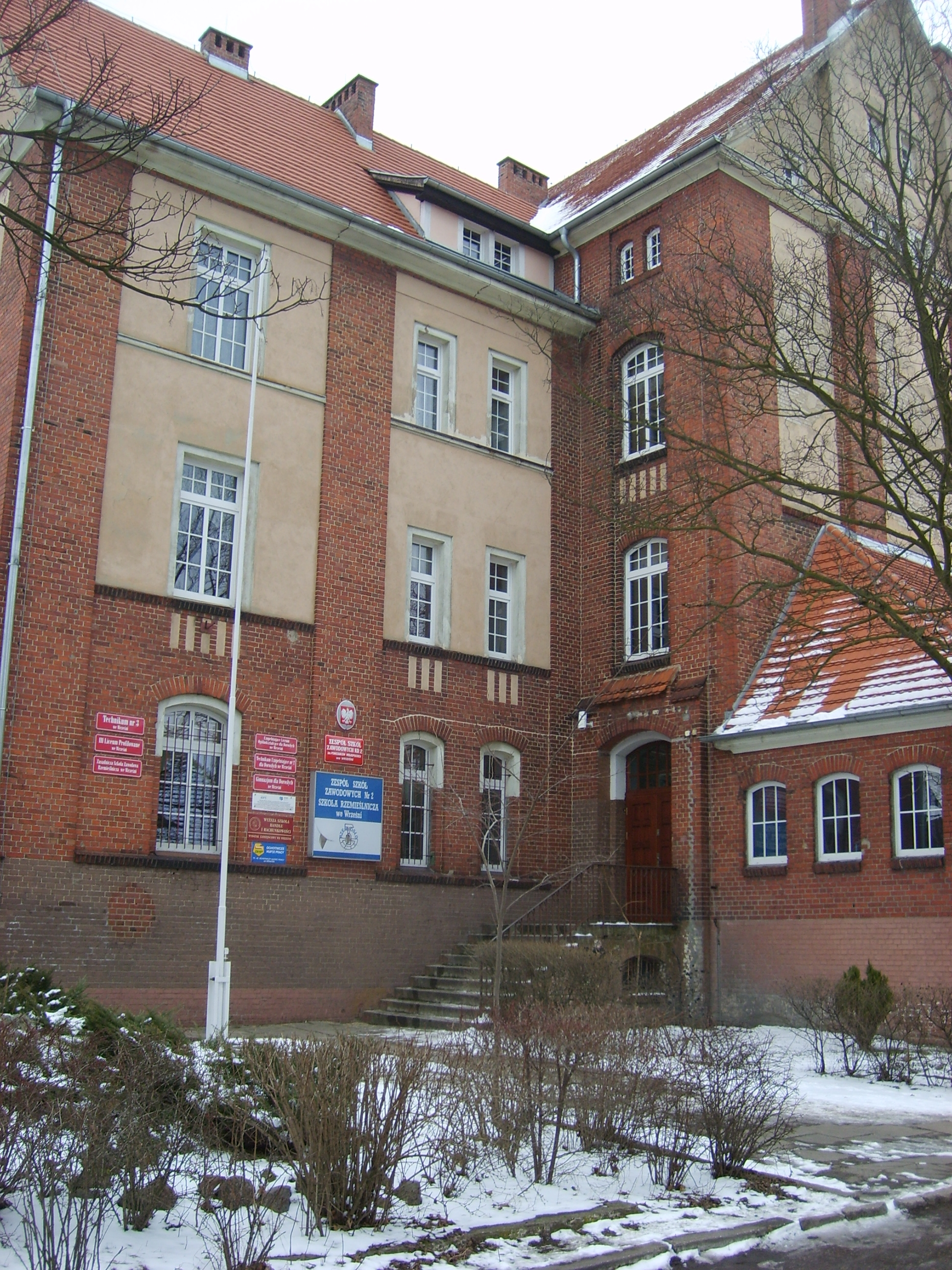 Zespół Szkół Zawodowych nr 2 we Wrześni